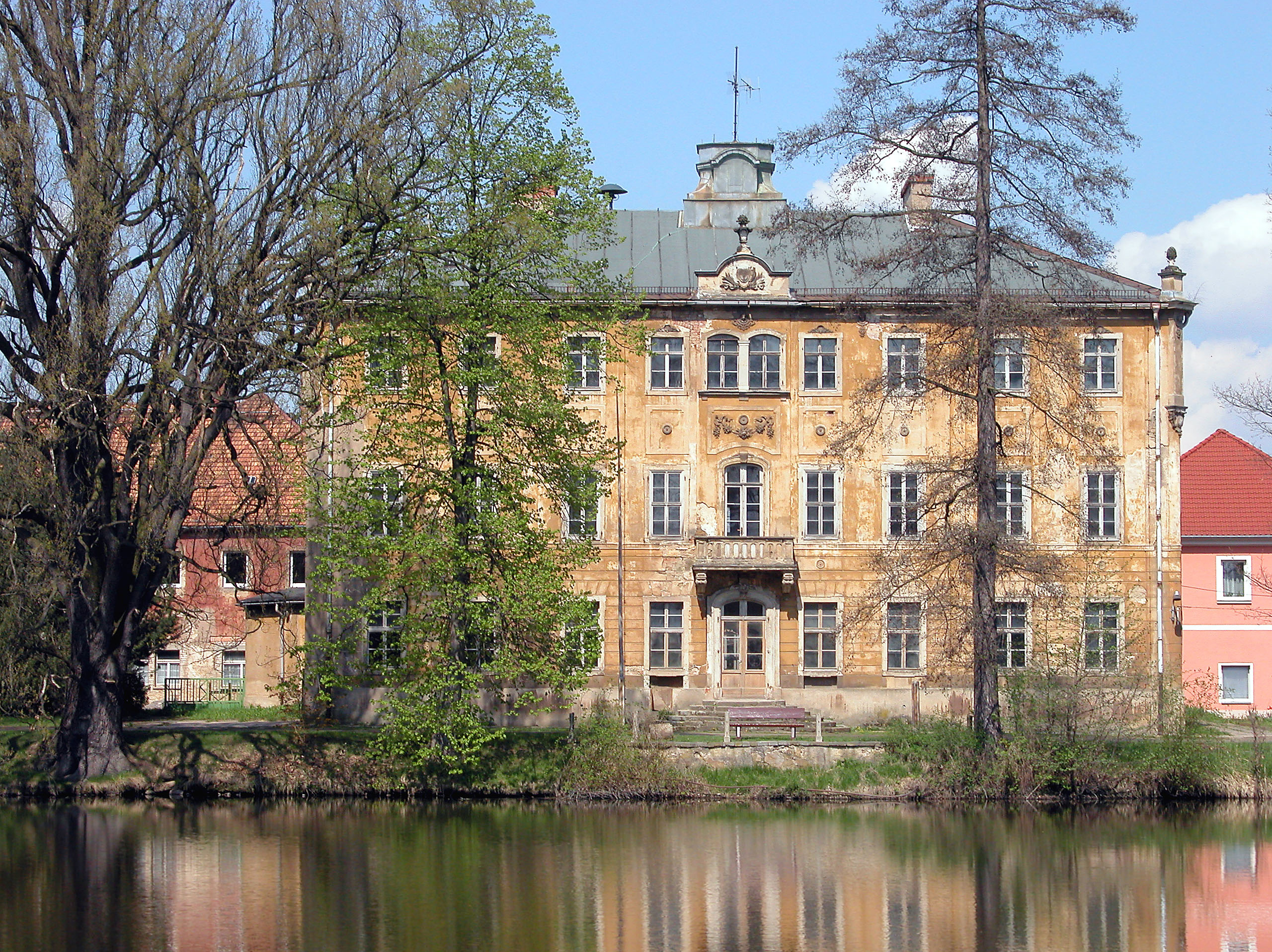 01.05.2006 01561 Lauterbach (Gem. Ebersbach, Schloßallee 1: Schloß, Parkseite. 1700 für Familie von Kirchbach errichtet und 1895 ein drittes Geschoß aufgesetzt. 1735 hatte Leopold Freiherr von Palm das Anwesen gekauft. Er war im diplomatischen Dienst für die österreichische Kaiserin Maria Theresia am Sächsischen Hof. Die Familie von Palm war bis 1930 hier ansässig. 1945 was das Schloß zunächst Quartier der Roten Armee, dann in der DDR bis 1963 Wohnheim des Instituts für Lehrerbildung Großenhain und bis 1982 Schule. Danach Leerstand. Derzeit ist ein Förderverein in Gründung. [DSCN9711.TIF]20060501075DR.JPG(c)Blobelt